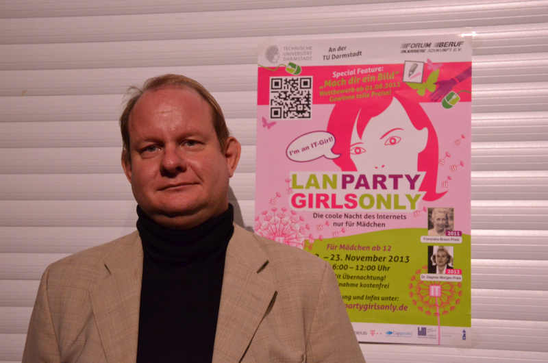 Karsten Weihe bei der LanParty Girls only 2013